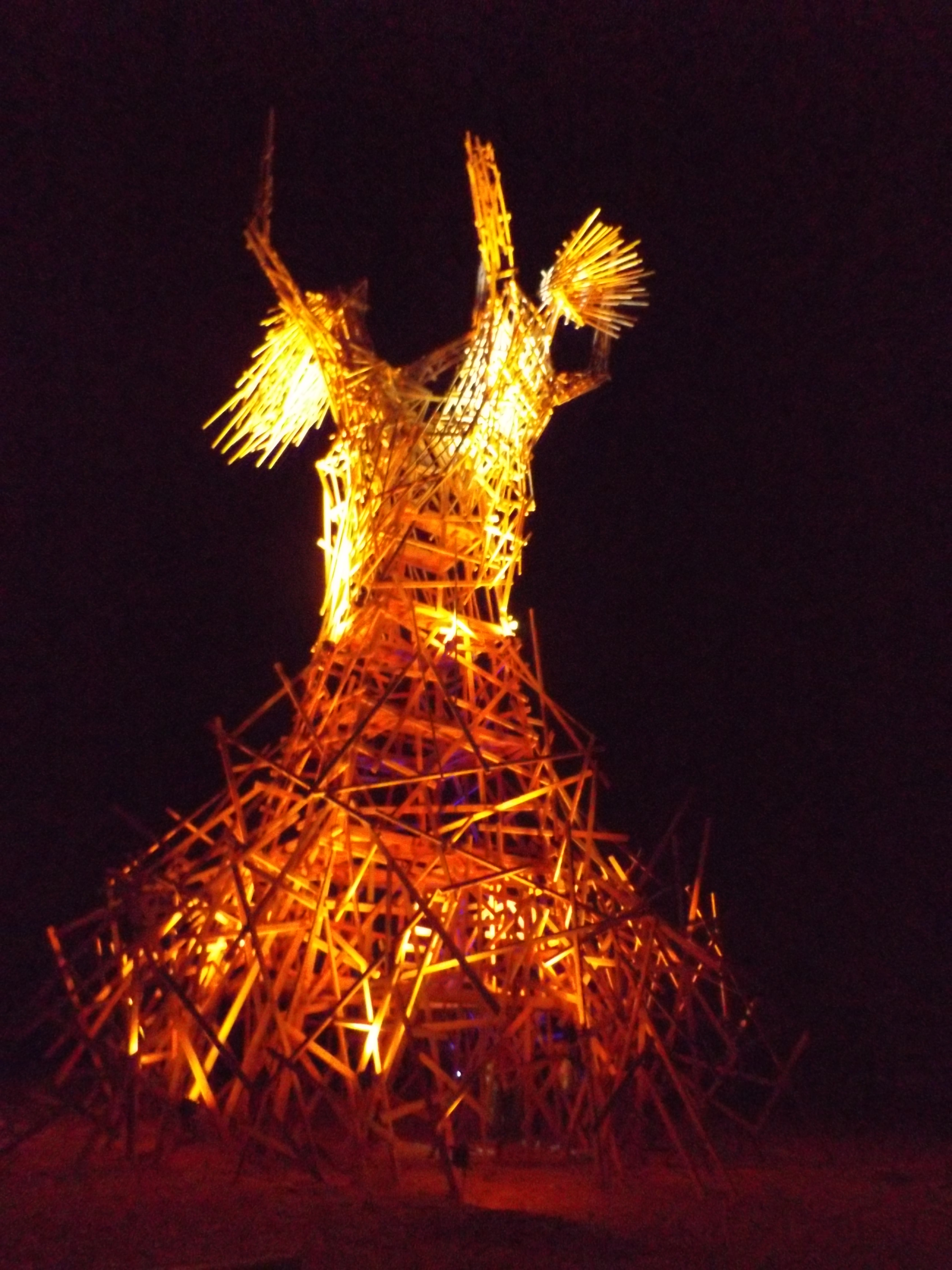 שריפה של האפיג'י במידברן 2015